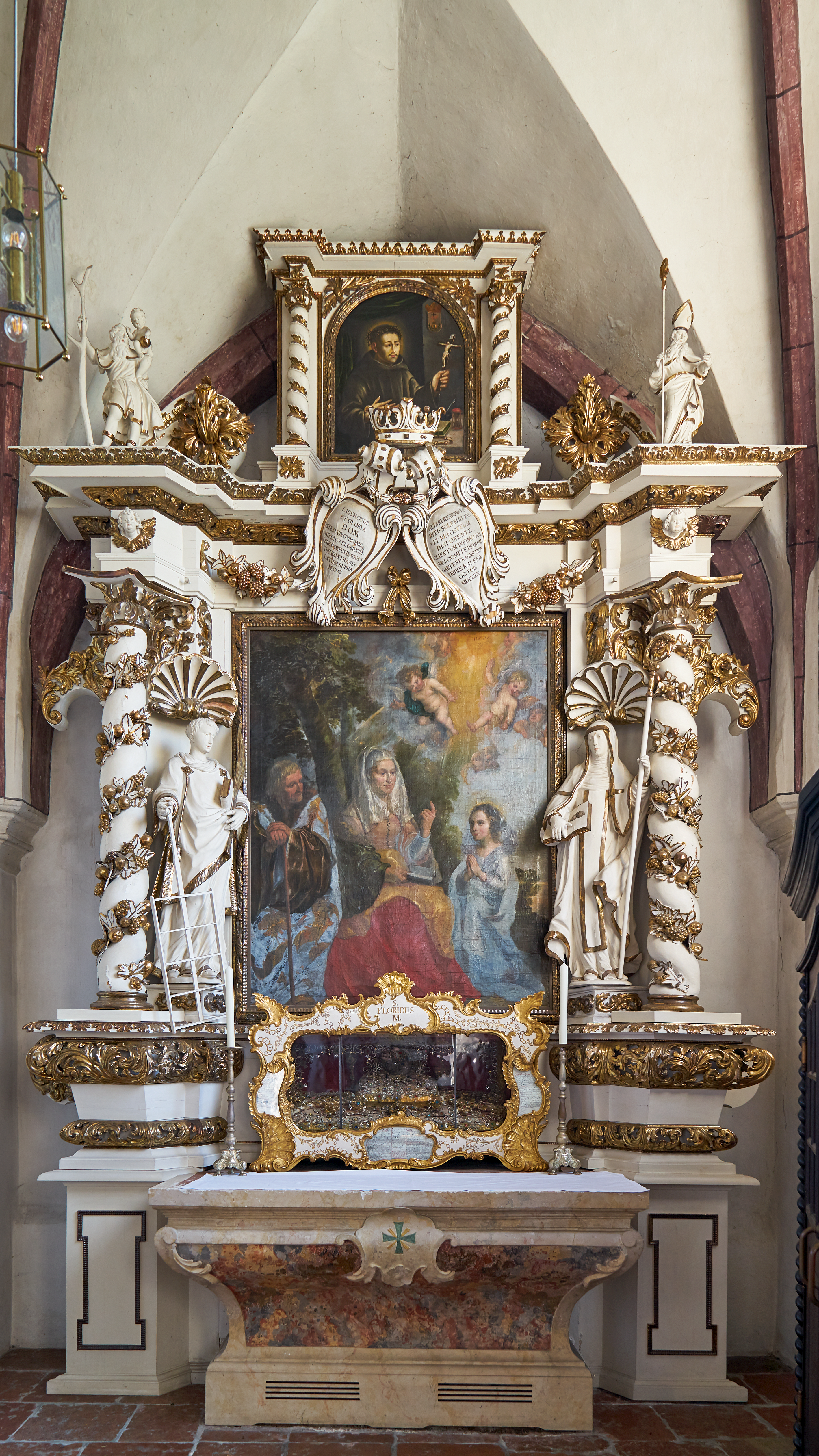 Katholische Pfarrkirche Mariä Himmelfahrt Ering. Altarbild in der Annakapelle, Joachim, Anna und Maria, 1709